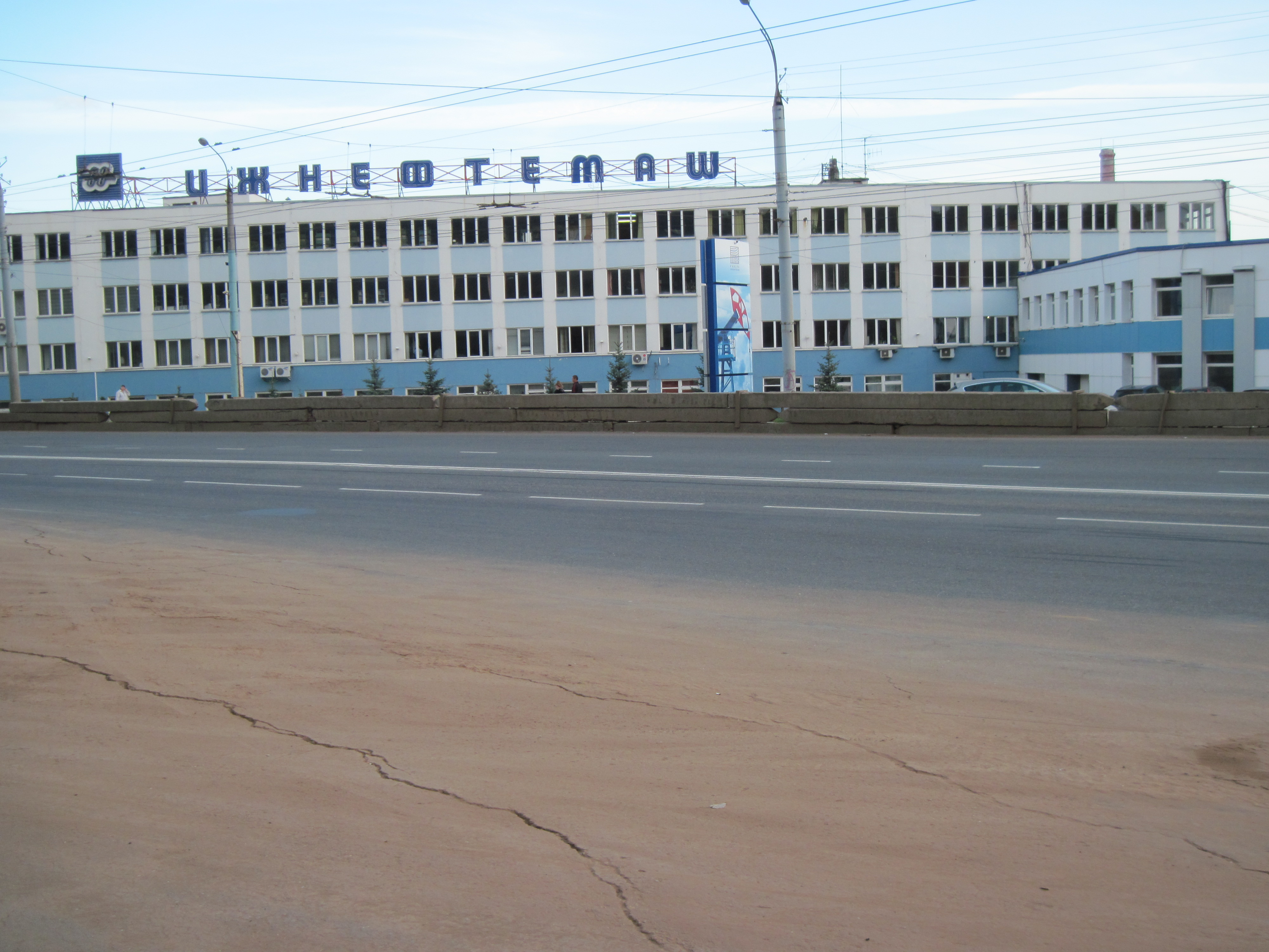 Административный корпус и проходная Ижевского завода Нефтяного Машиностроения.Август 2012 года